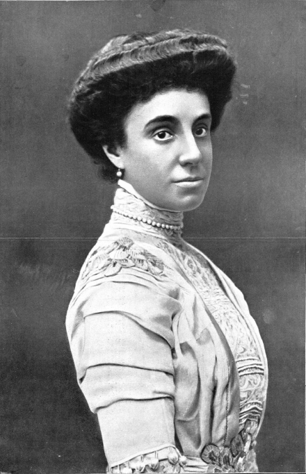 Retrato de la infanta María Teresa de Borbón publicado en 1912 con motivo de su prematuro fallecimiento